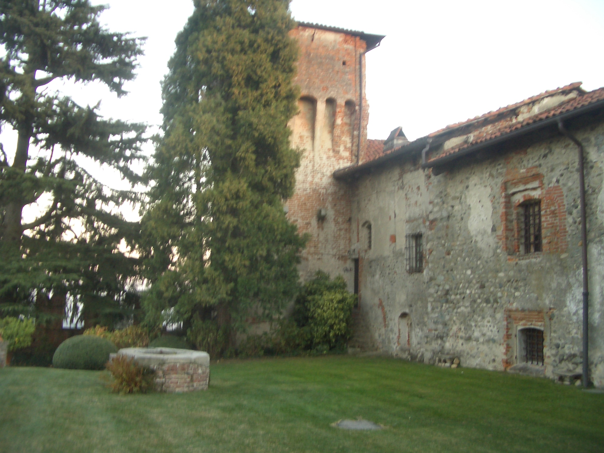 The castle, Moncrivello, Vercelli, Italy